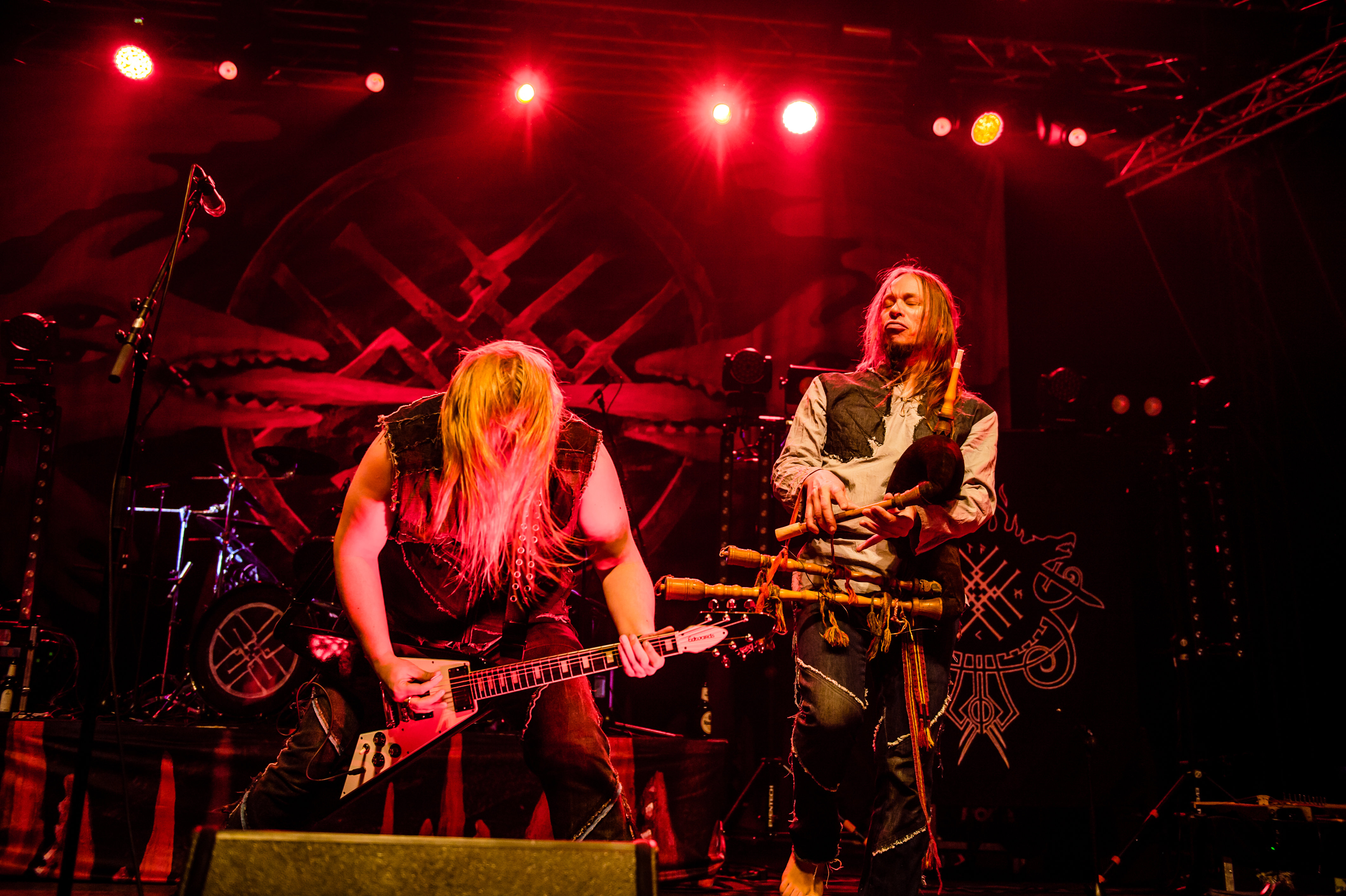 'Metsatöll - Ruhrpott Metal Meeting 2015 - Oberhausen'